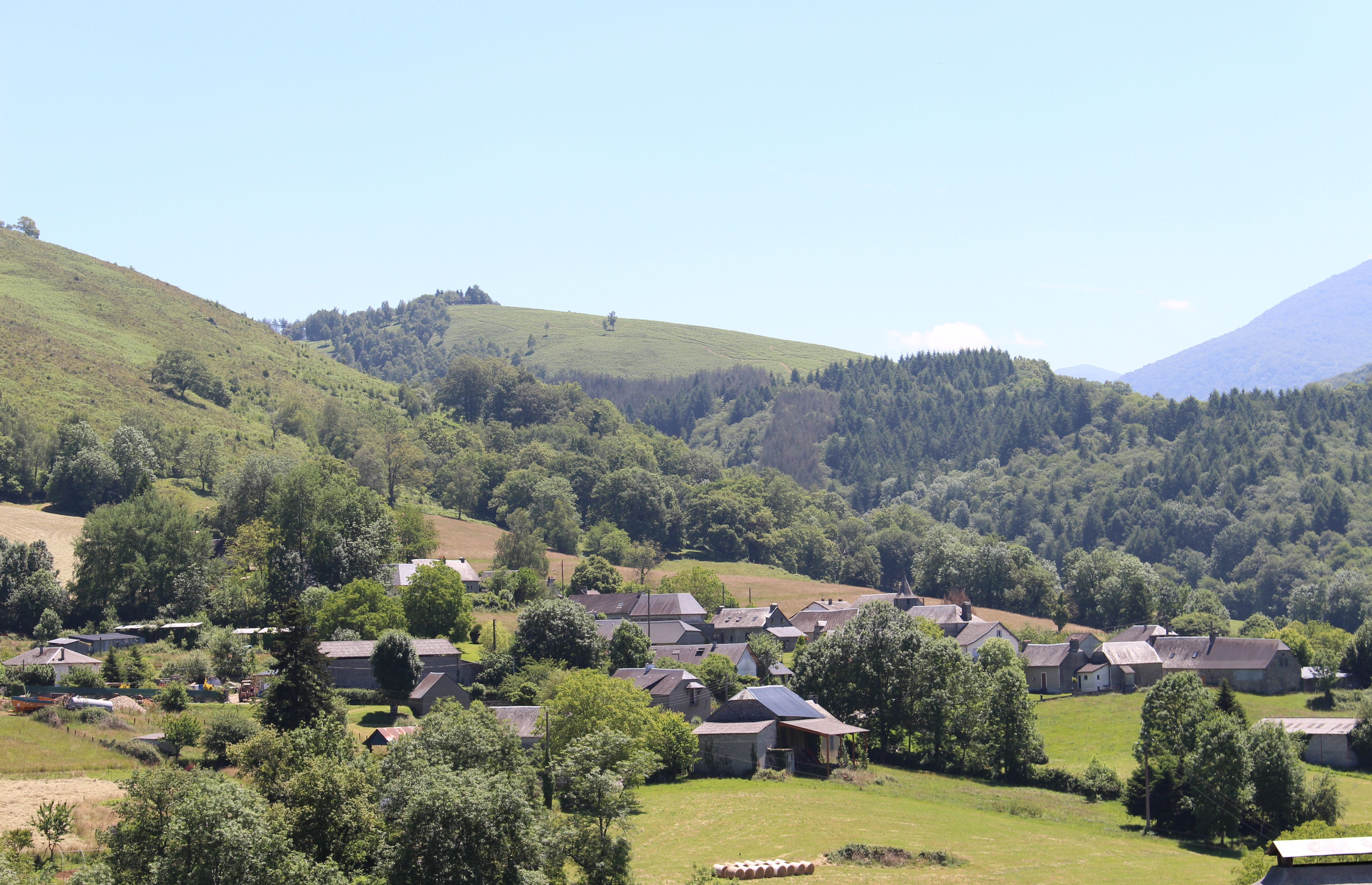 Espèche (Hautes-Pyrénées)